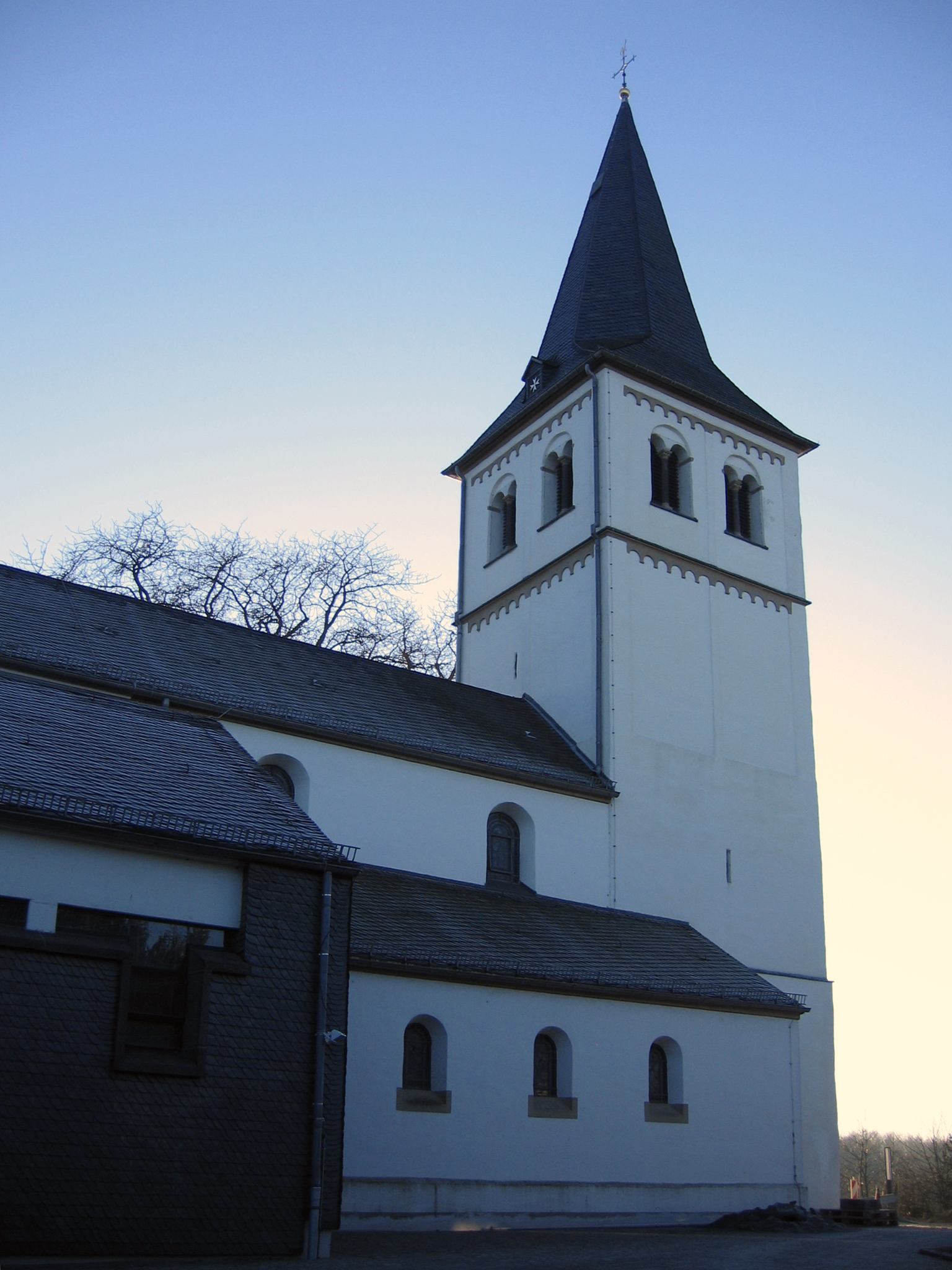 Kirche St.Antonius Abbas in Herkenrath